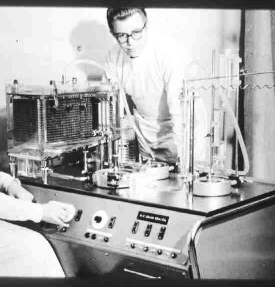 Das Bild zeigt die erste deutsche Herz-Lungen-Maschine, 1958